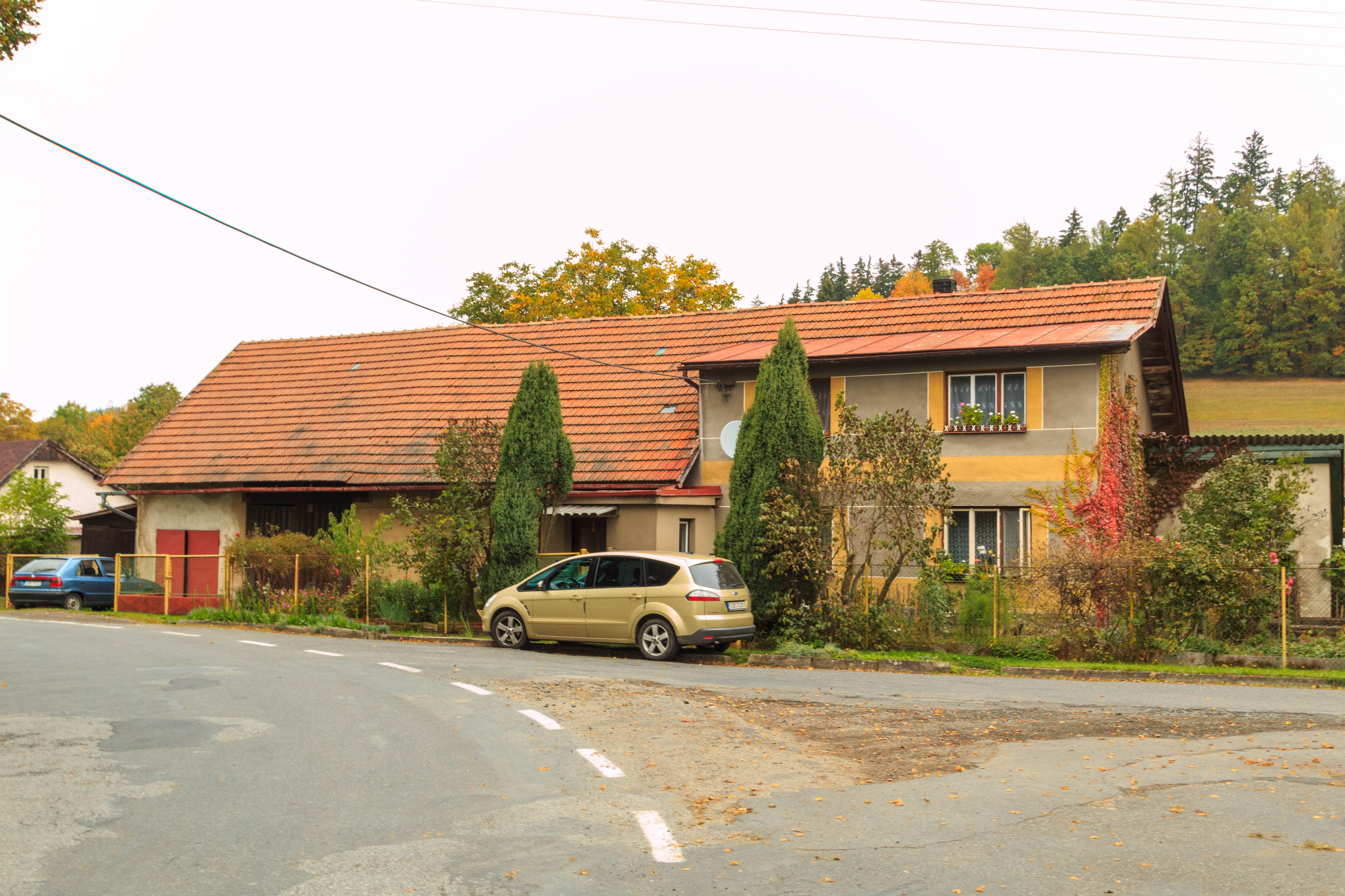 Jeníkovec čp. 7